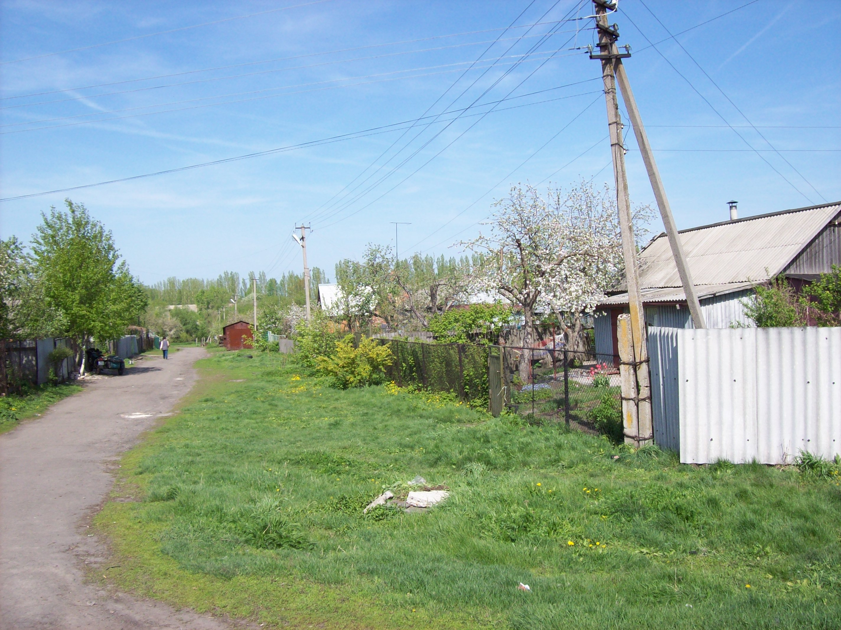 Воронежская область. Новоусманский район. Одна из улиц с. Хлебное